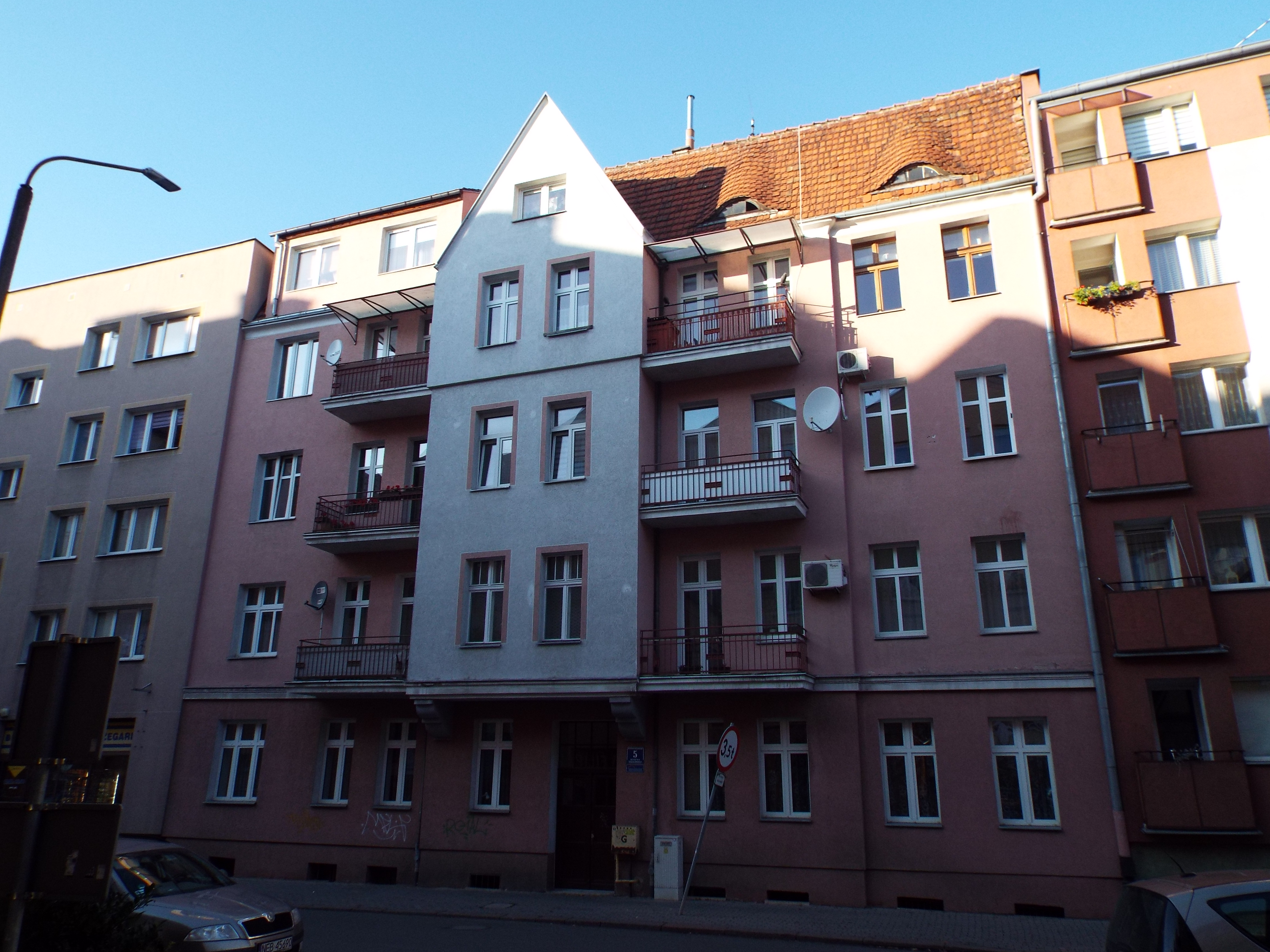 Elbląg, ul. Henryka Nitschmanna 5 - kamienica Nitschmanna Henryka 5